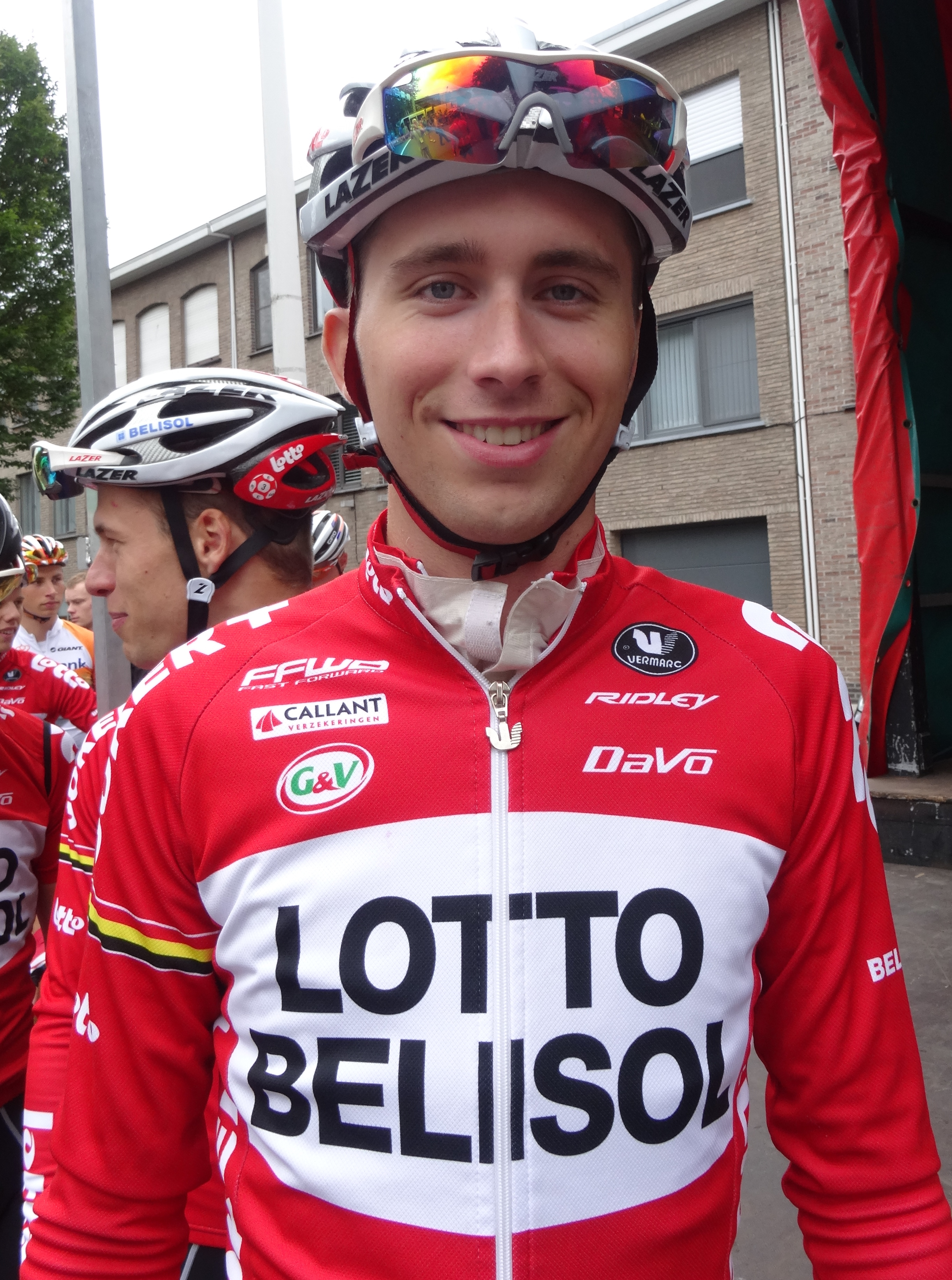 Reportage photographique réalisé le dimanche 10 août à l'occasion du départ et de l'arrivée de la Flèche du port d'Anvers 2014 à Merksem (Anvers), Belgique.